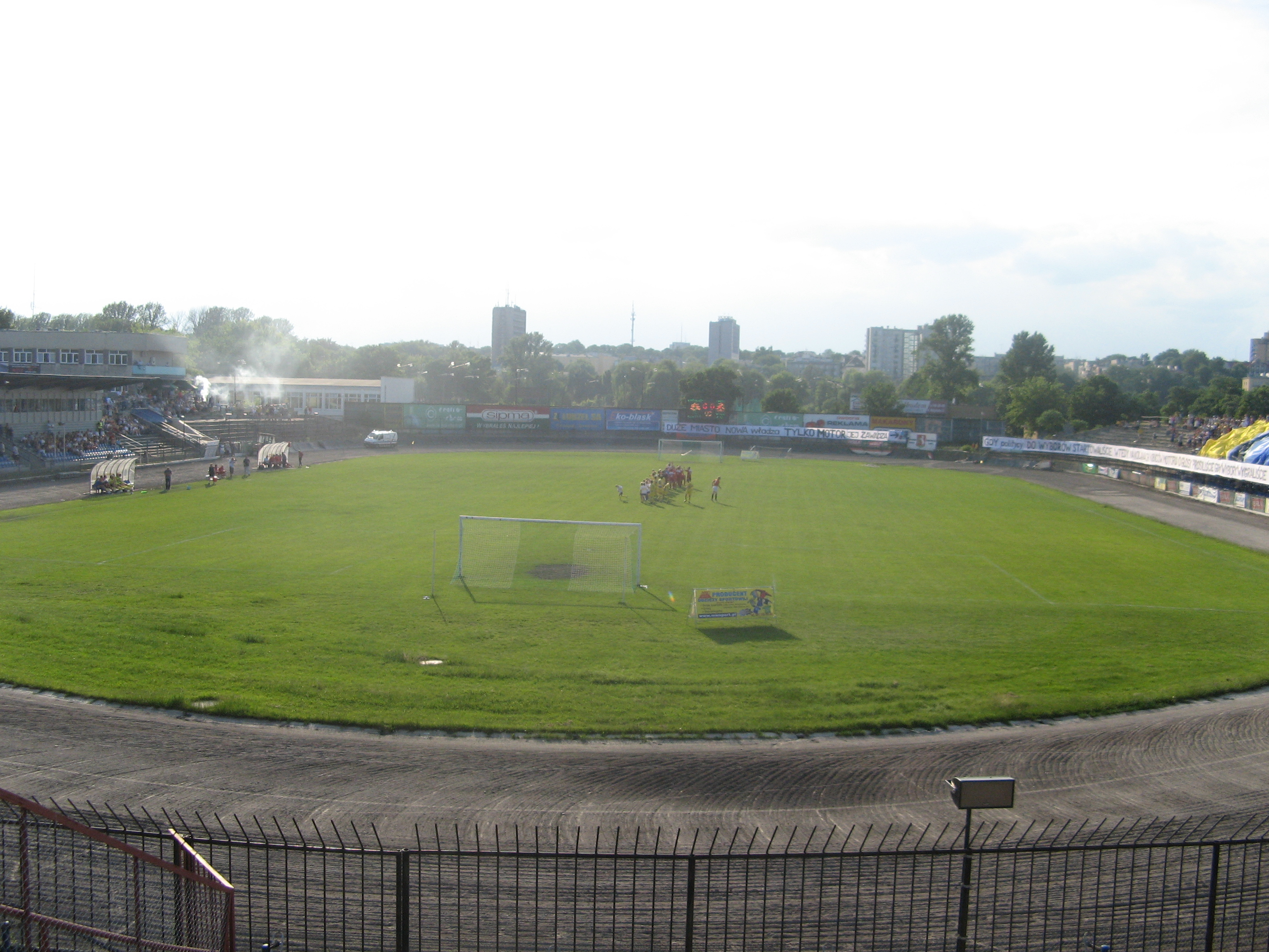 Motor Lublin stadium